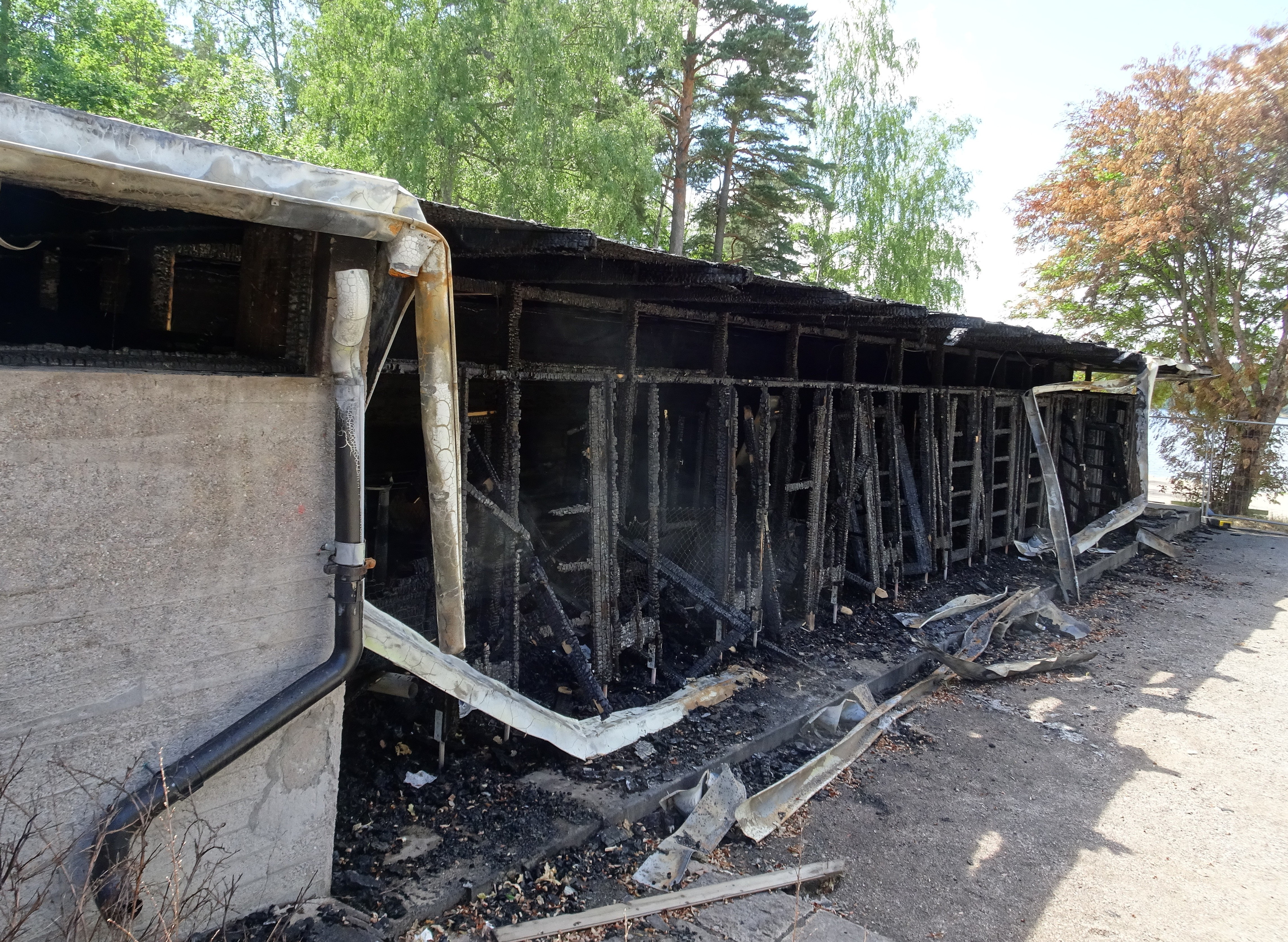 Flatenbadets byggnader, arkitekt Paul Hedqvist (den 23 juni 2020 nedbrunnen länga)